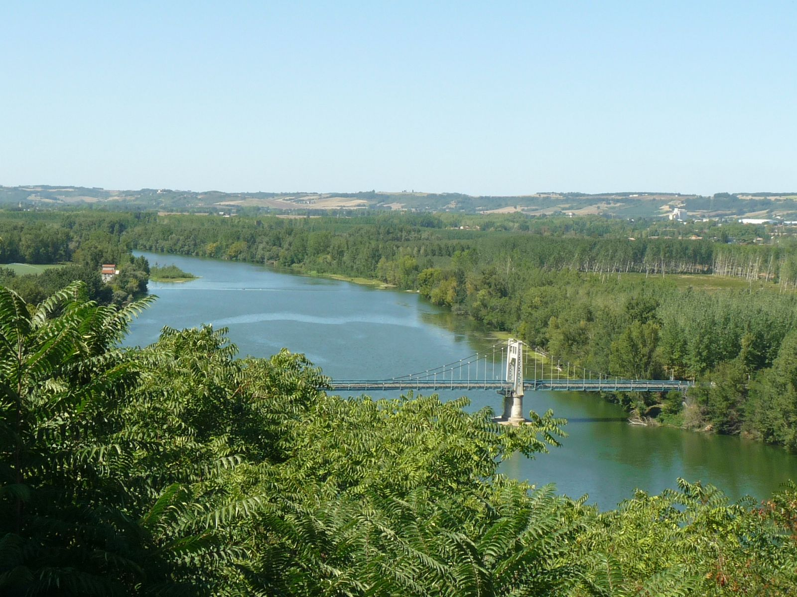 La Garonne vue depuis Auvillar (Tarn-et-Garonne).